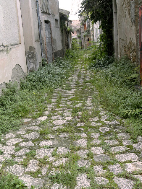 Apice (BN), il paese abbandonato.